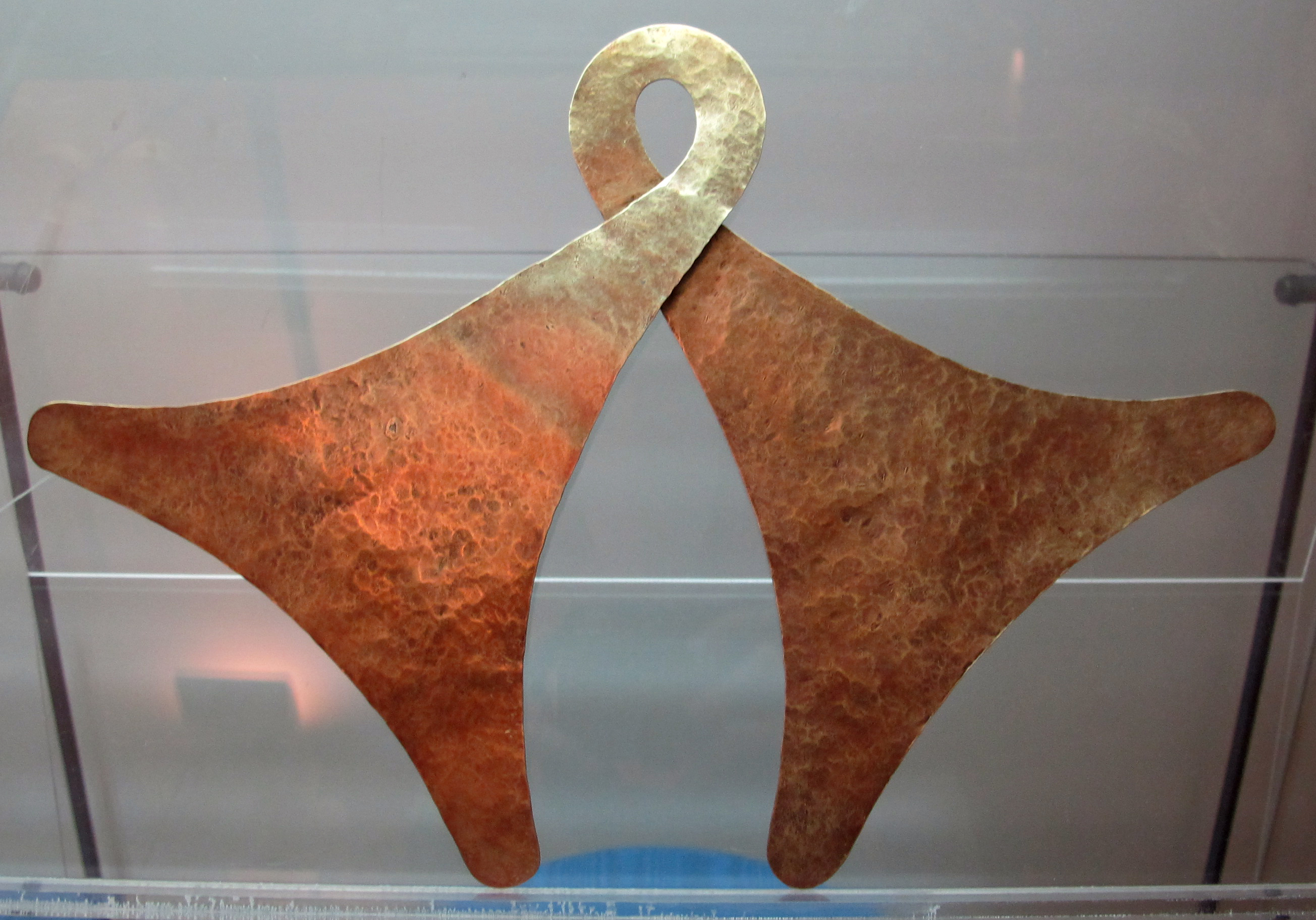 Isola di sumba, pettorale mrangga, oro, xix-xx sec